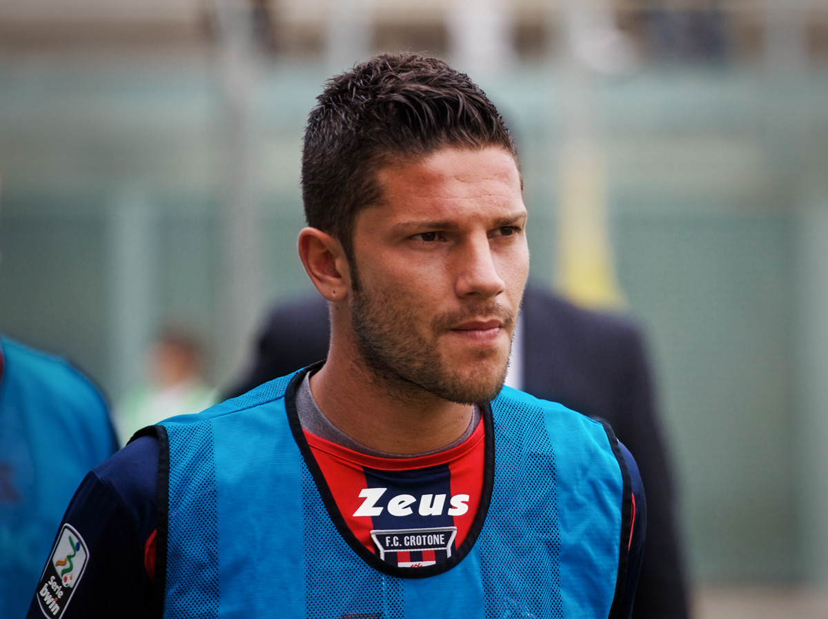 Primo piano di Andrea Russotto